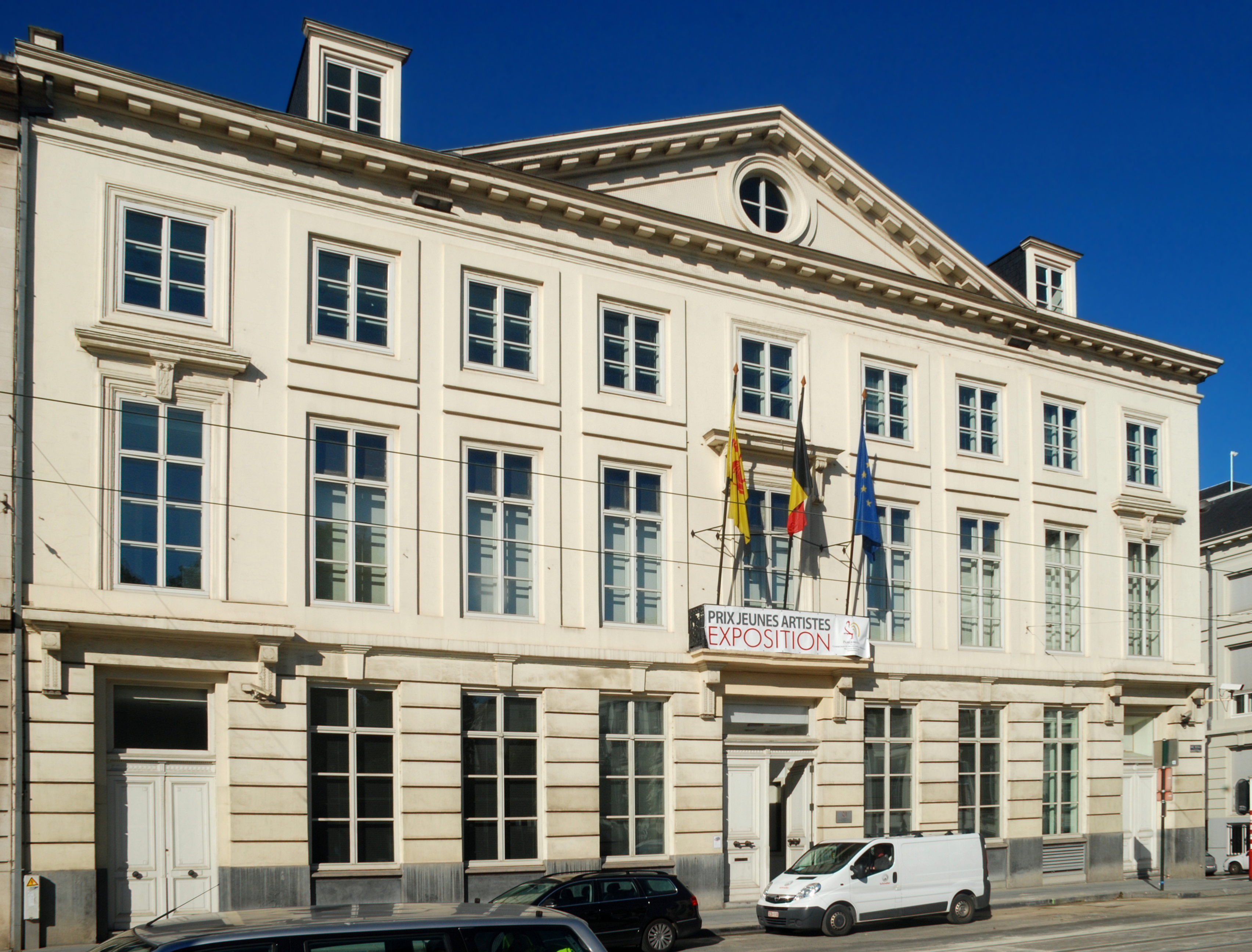 Belgique - Bruxelles - Hôtel de Ligne